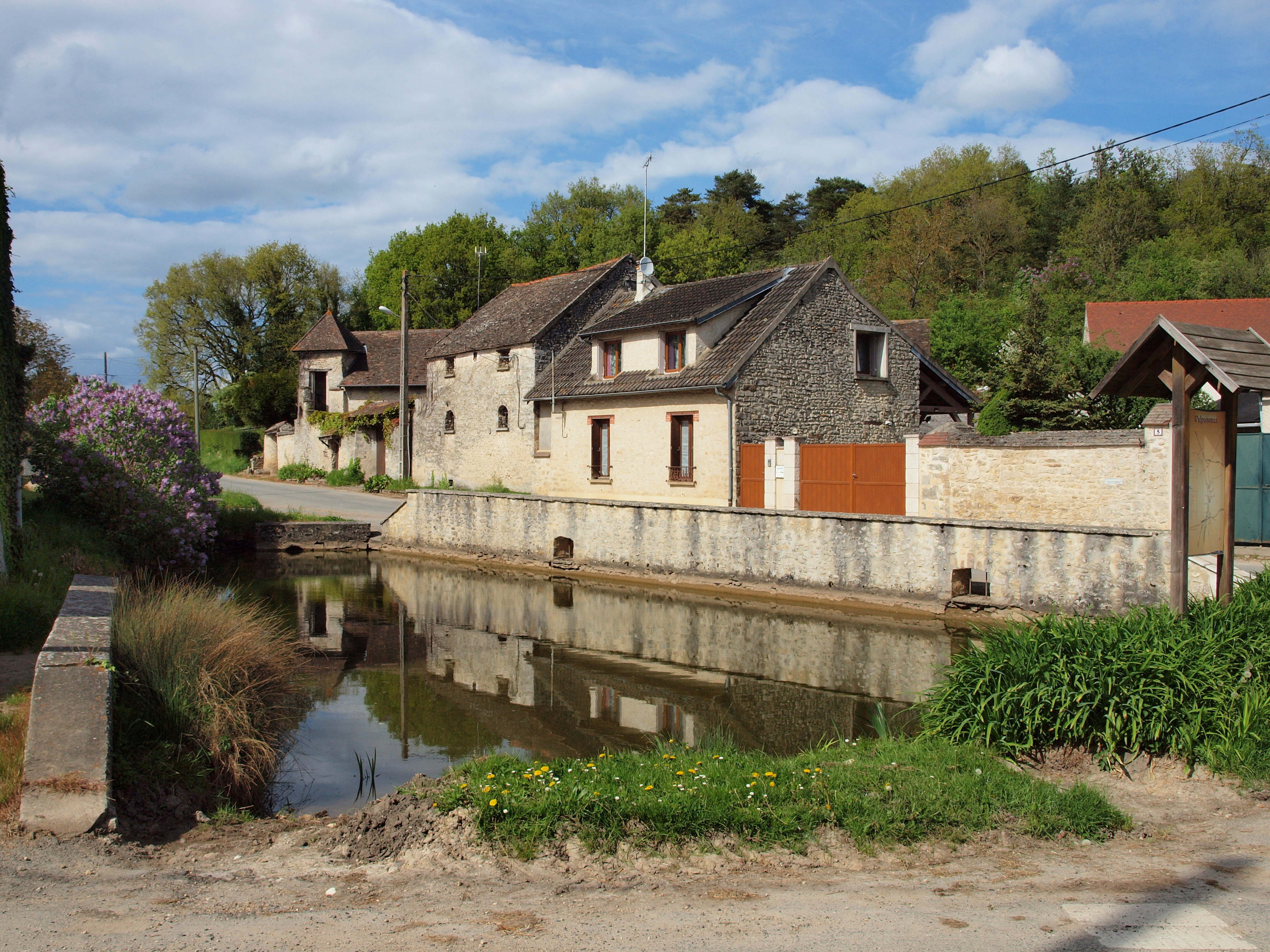 Valpuiseaux (Essonne, France) ; la mare (gloye) du village réaménagée (les troupeaux de bovins ou d'ovins n'y viennent plus boire)